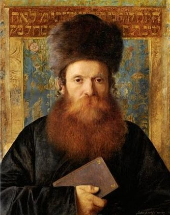 Tranh vẽ chân dung một sư phụ người do thái tóc đỏ râu quai nón đỏ